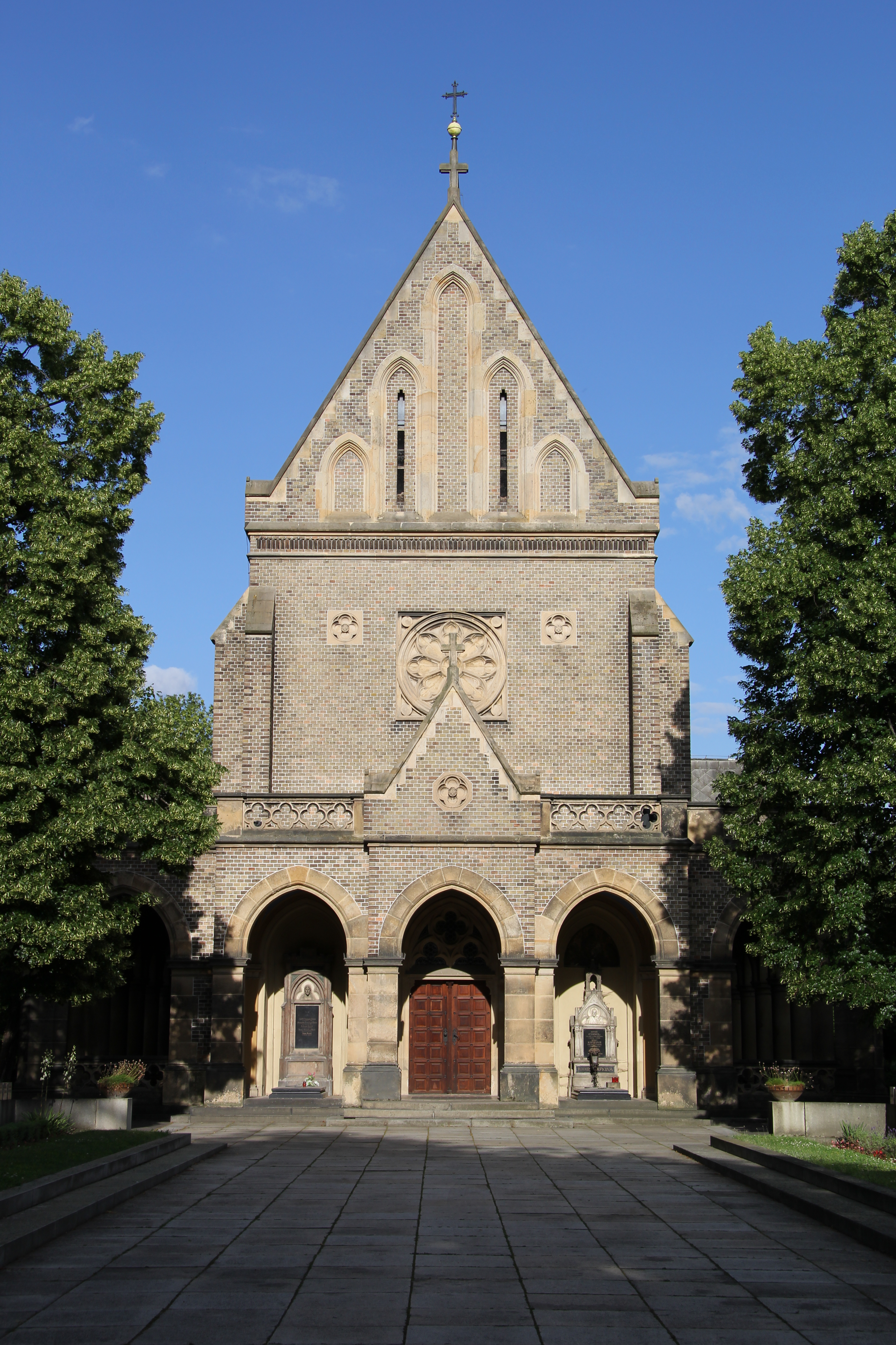 Kaple svatého Václava na Vinohradském hřbitově (2015)